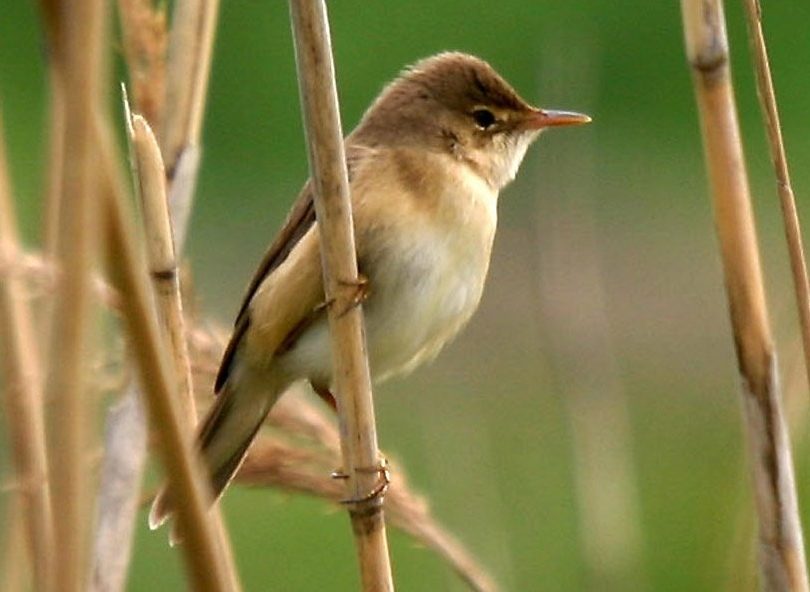 29601 Kleine Karekiet / Reed Warbler